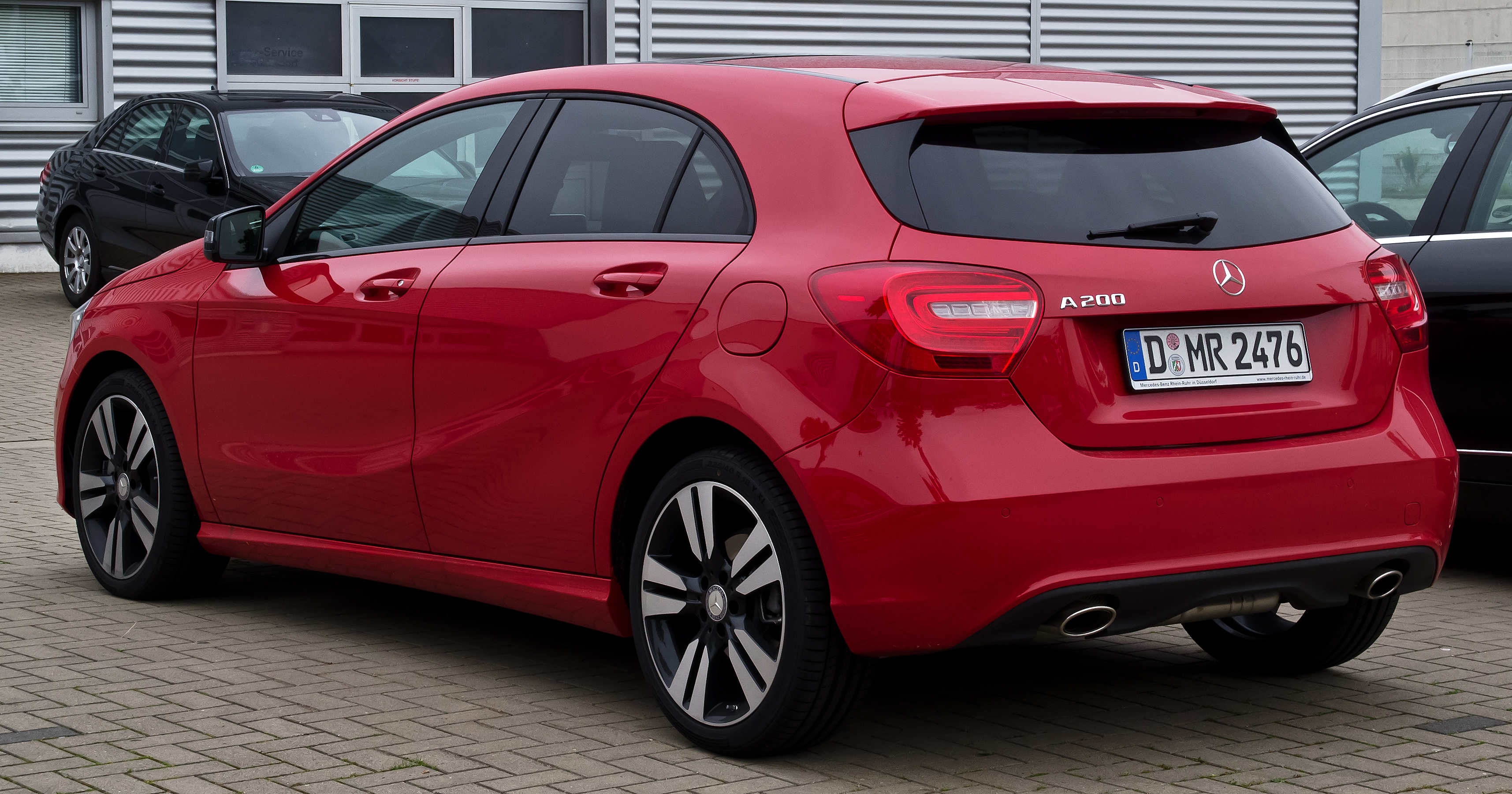 Mercedes-Benz A 200 Night-Paket (W 176)